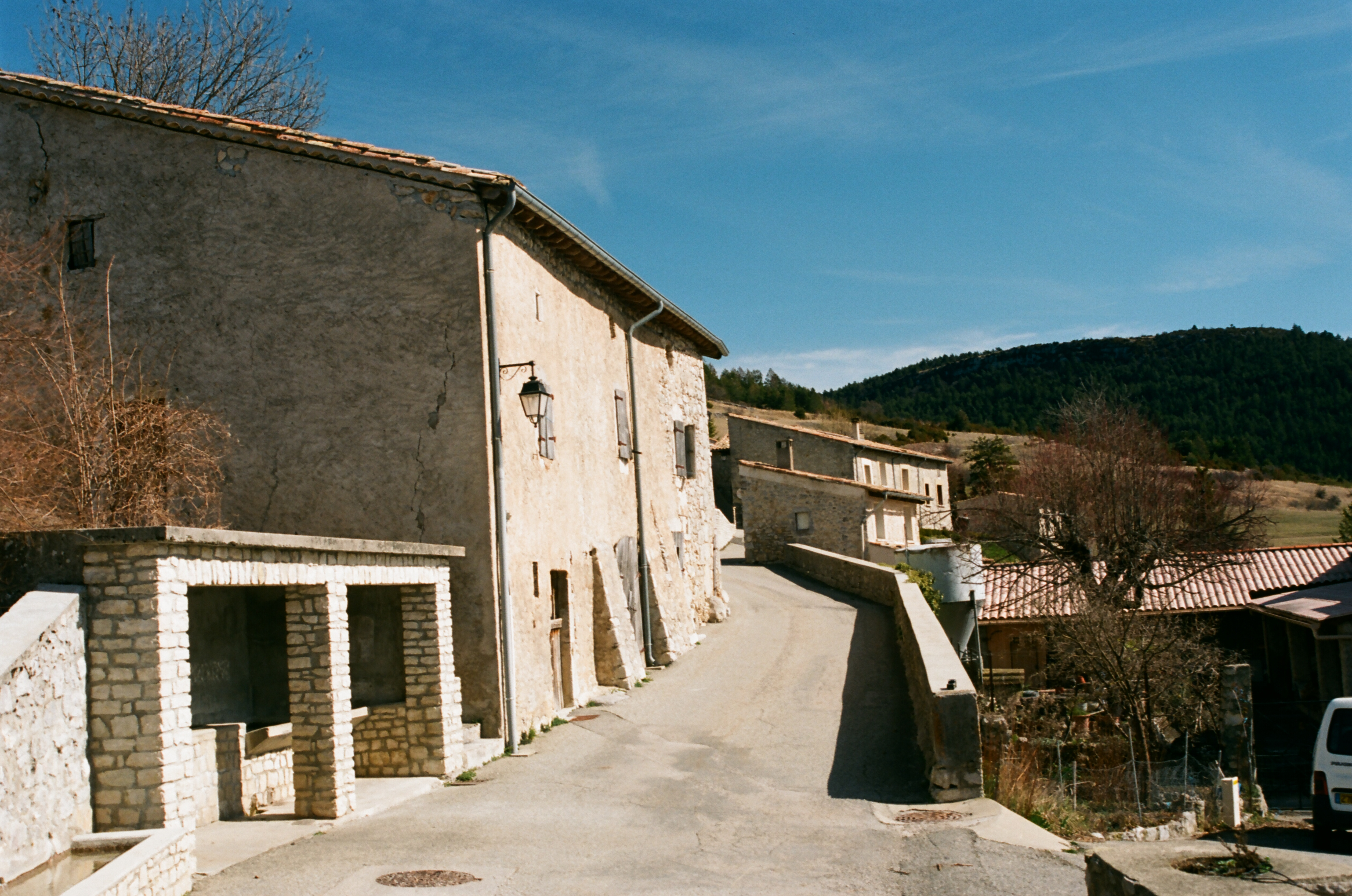 Rimon (Drôme)